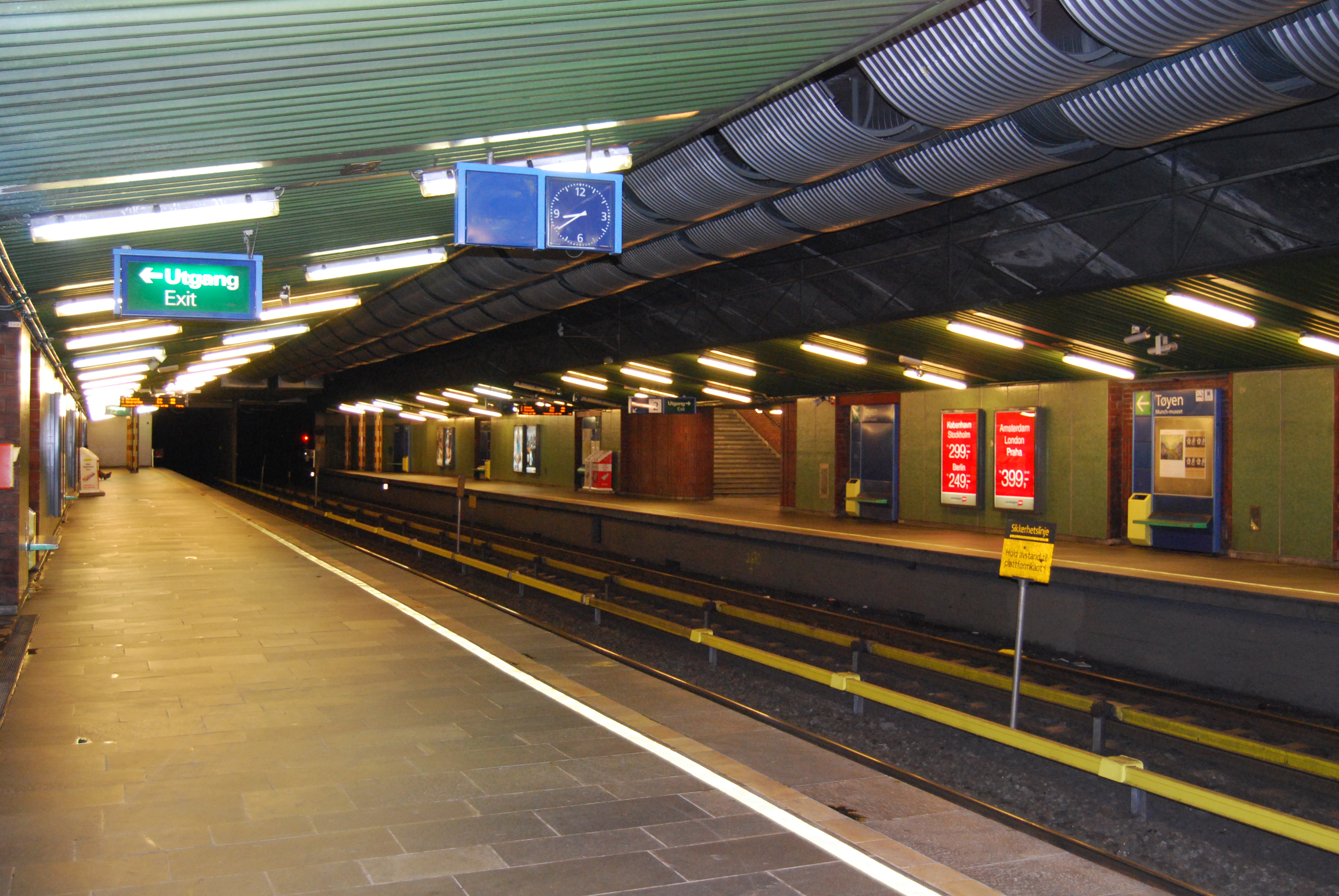 Tøyen stasjon; stacja T-bane (Oslo) czerwic 2009 r.